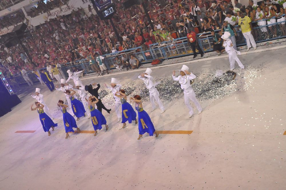 Samba school parade 2010 in Rio de Janeiro.